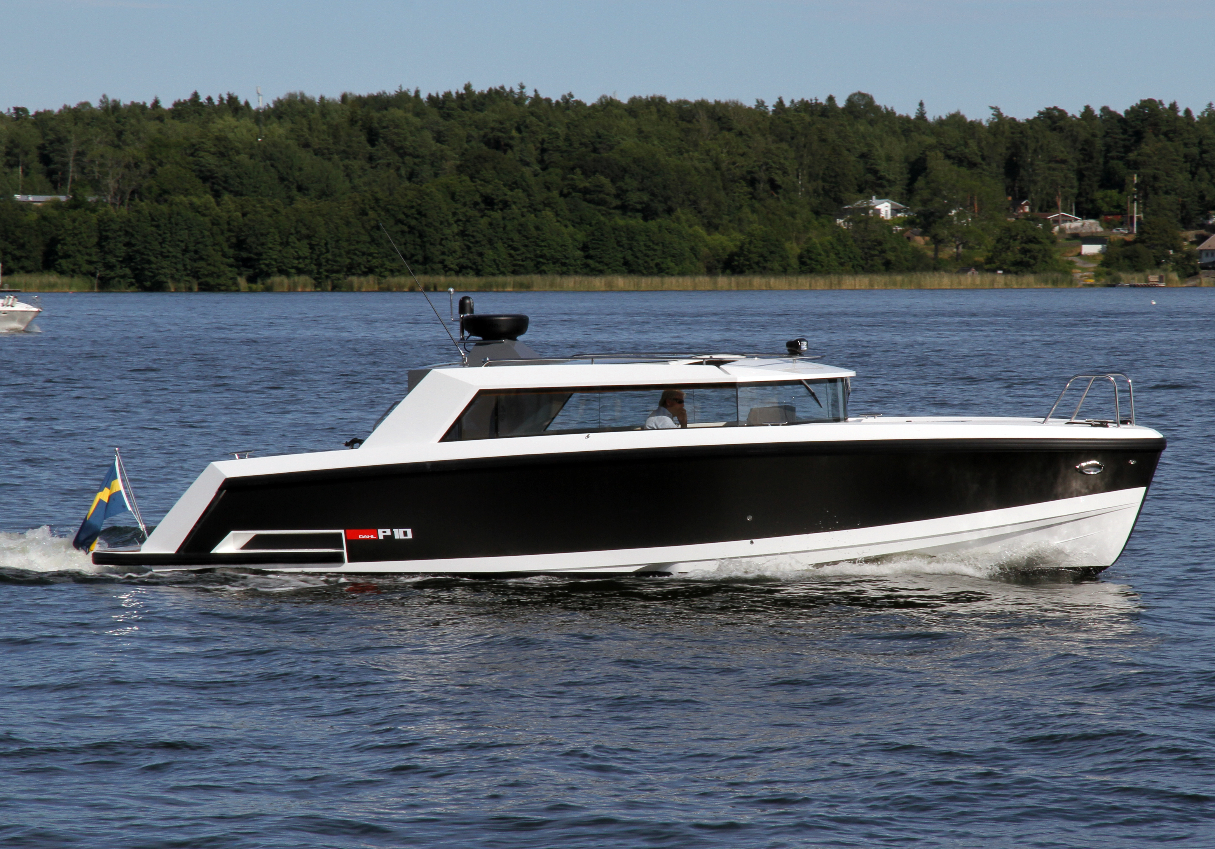 Dahl Patrol 10 i Vaxholm 3 augusti 2015